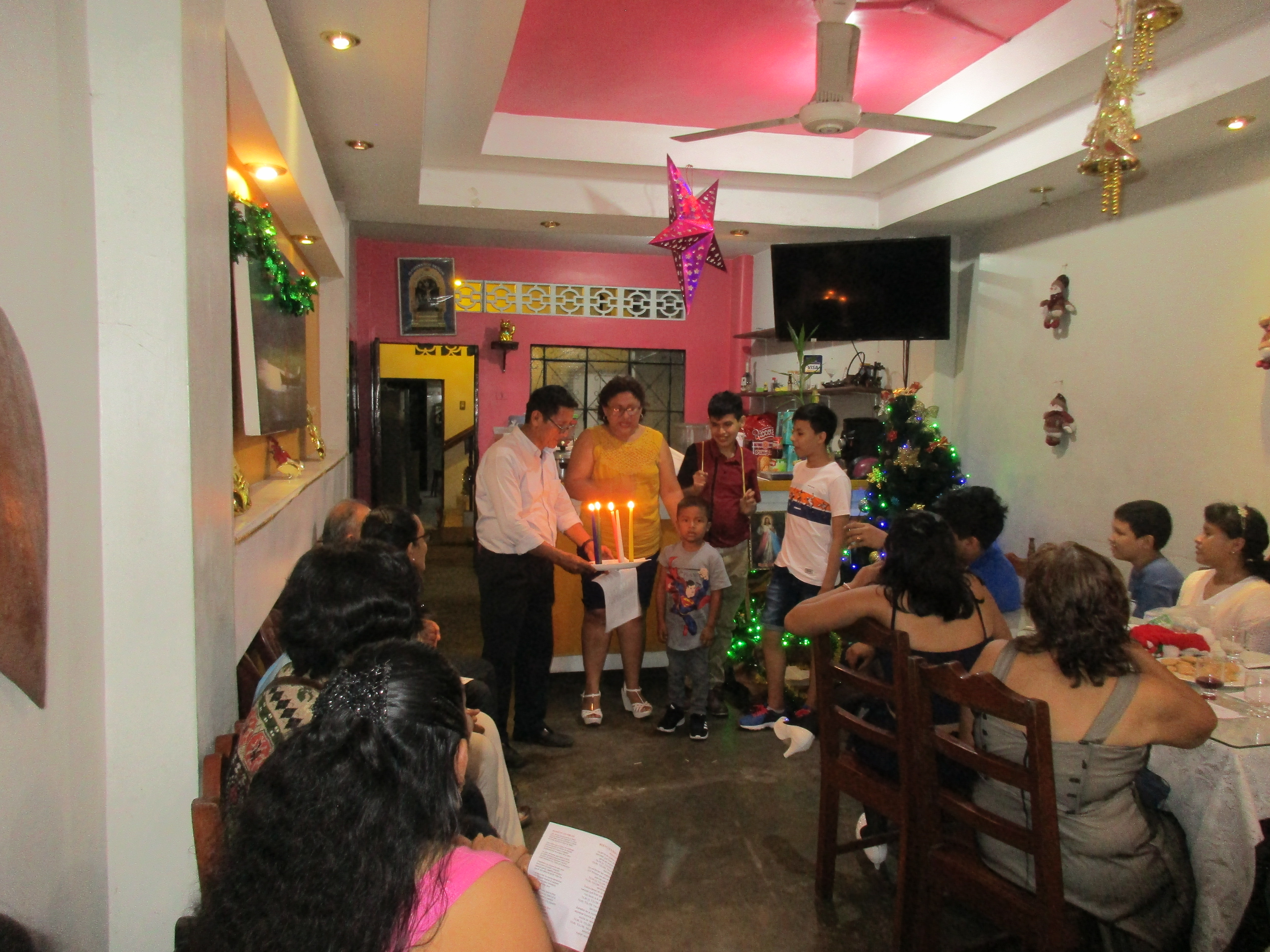 Limpieza de navidad en Iquitos, Perú.